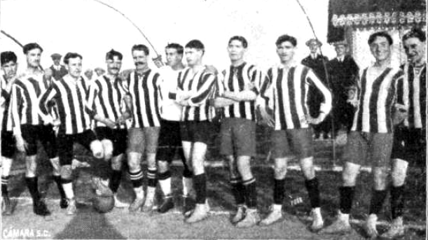 Primer equipo del Real Club Deportivo ganador de la Copa España disputada el 7 de septiembre de 1912 en La Coruña